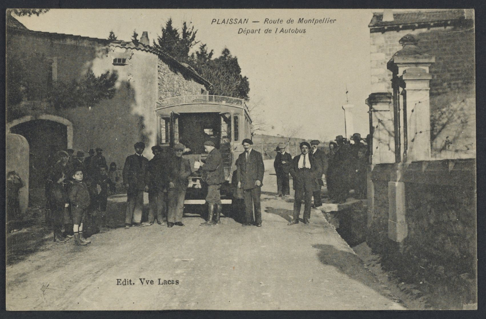 Plaissan. - Route de Montpellier, départ de l'autobus : carte postale.